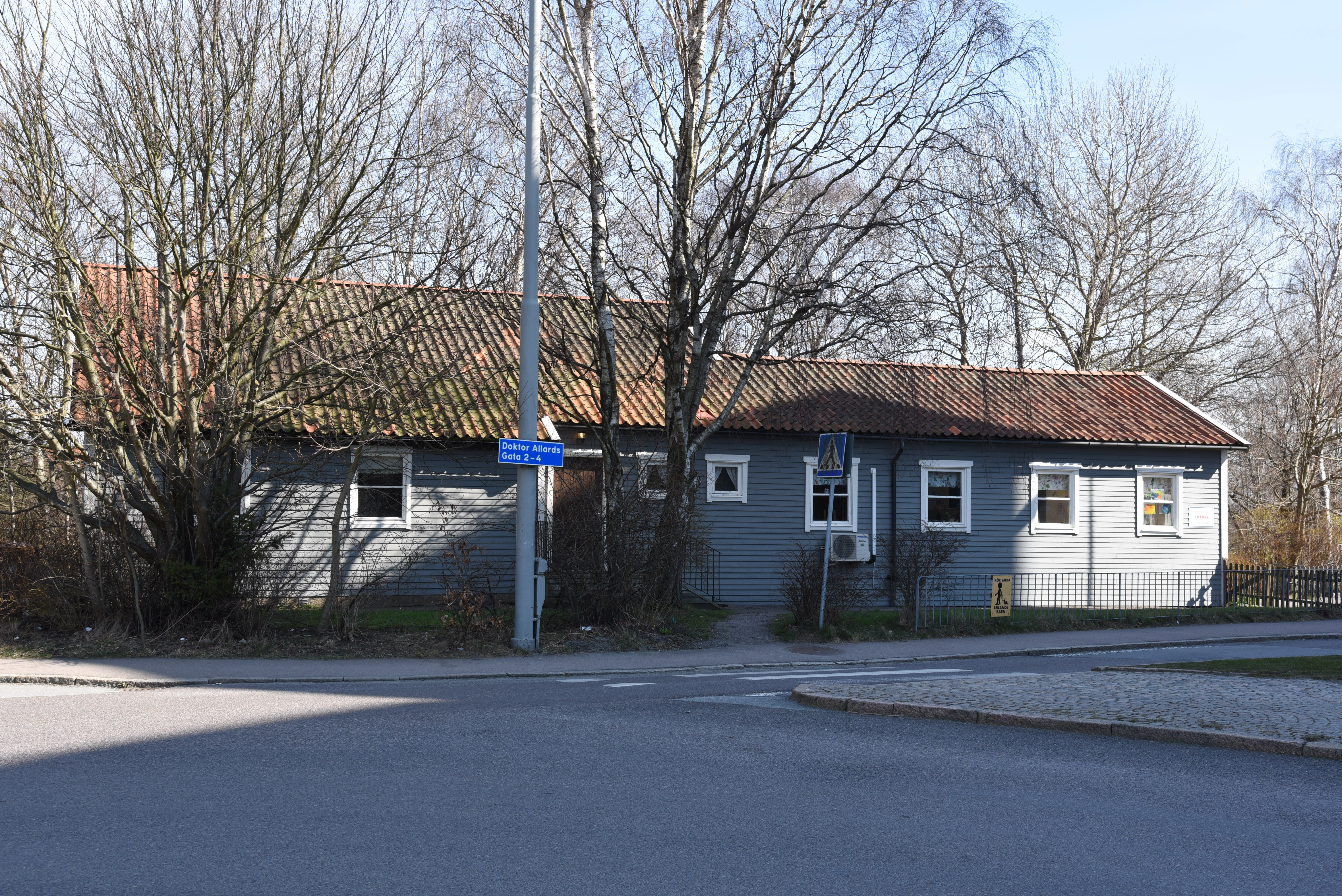 Barackkyrkan vid Doktor Allards Gata 2 i stadsdelen Guldheden i Göteborg.